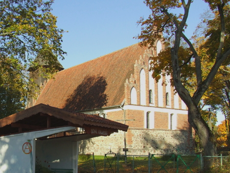 Nowe Kawkowo - w głębi rzymskokatolicki kościół parafialny p.w. św. Jana Ewangelisty 03.1968.